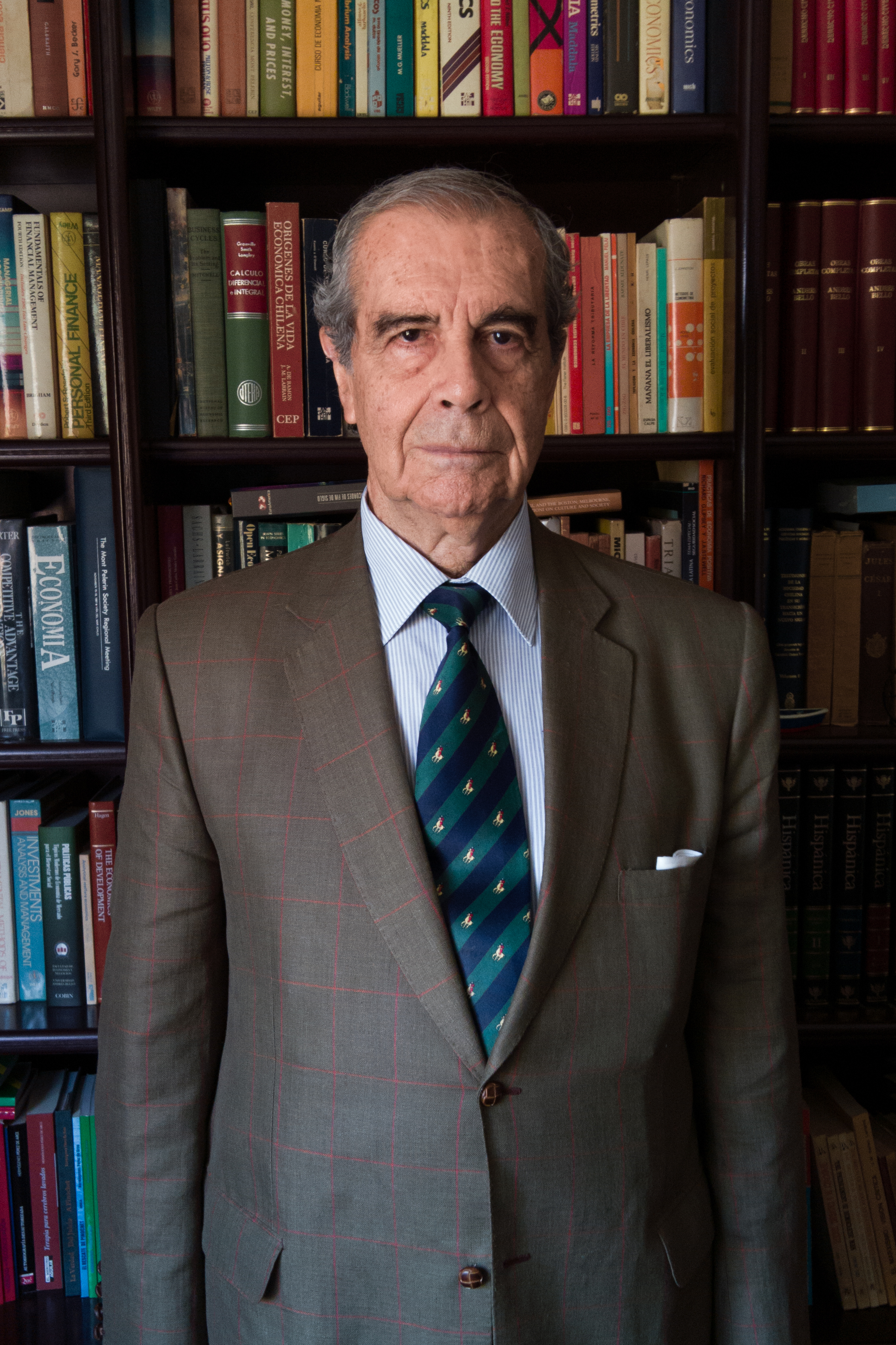 Hermógenes Pérez de Arce Ibieta en 2018.